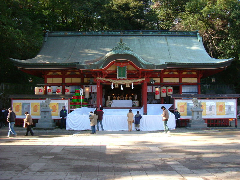 正月の本殿。正面が大きな賽銭箱になっている。